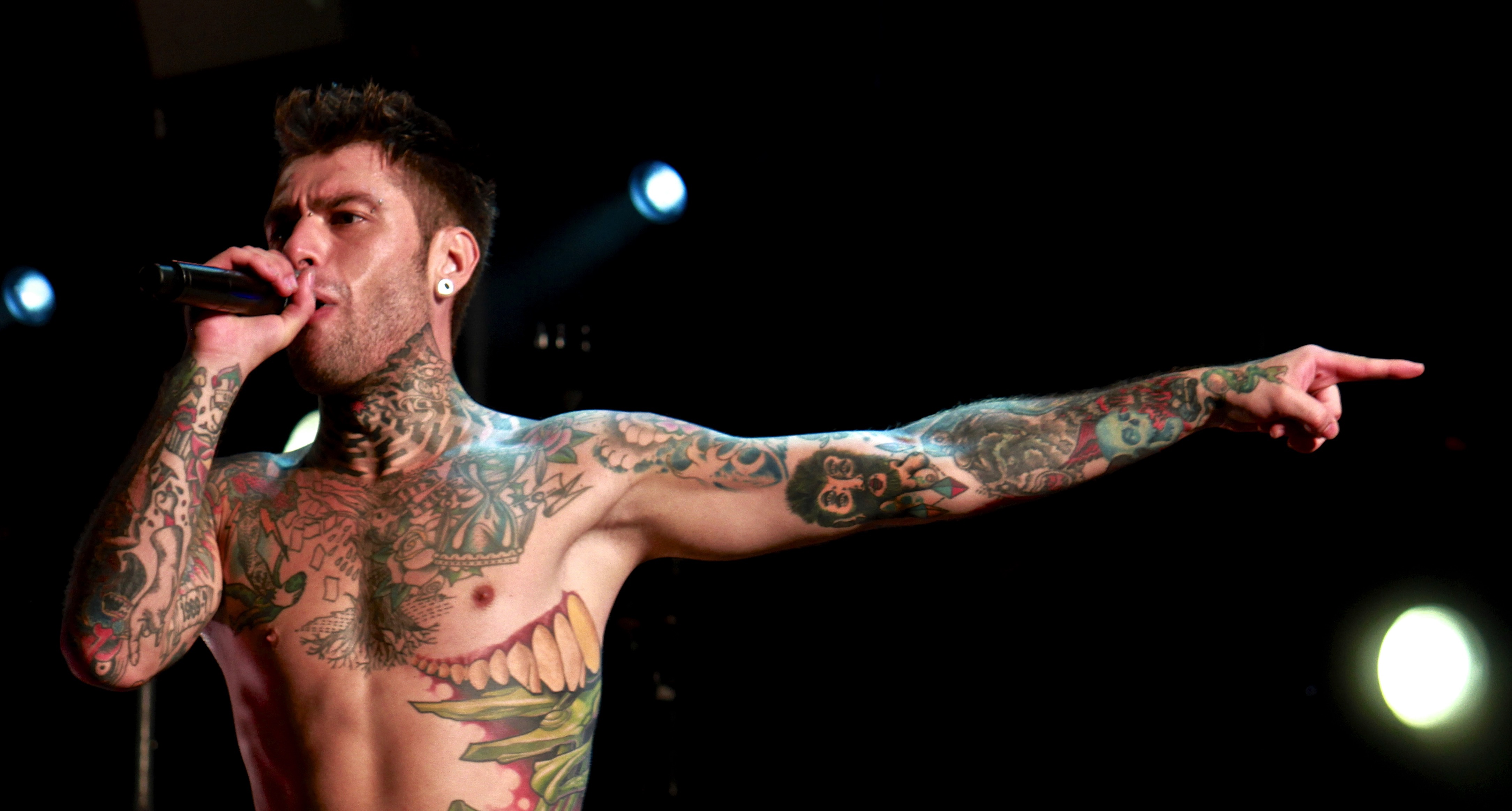 Fedez, Grugliasco (TO), 2015-07-18.